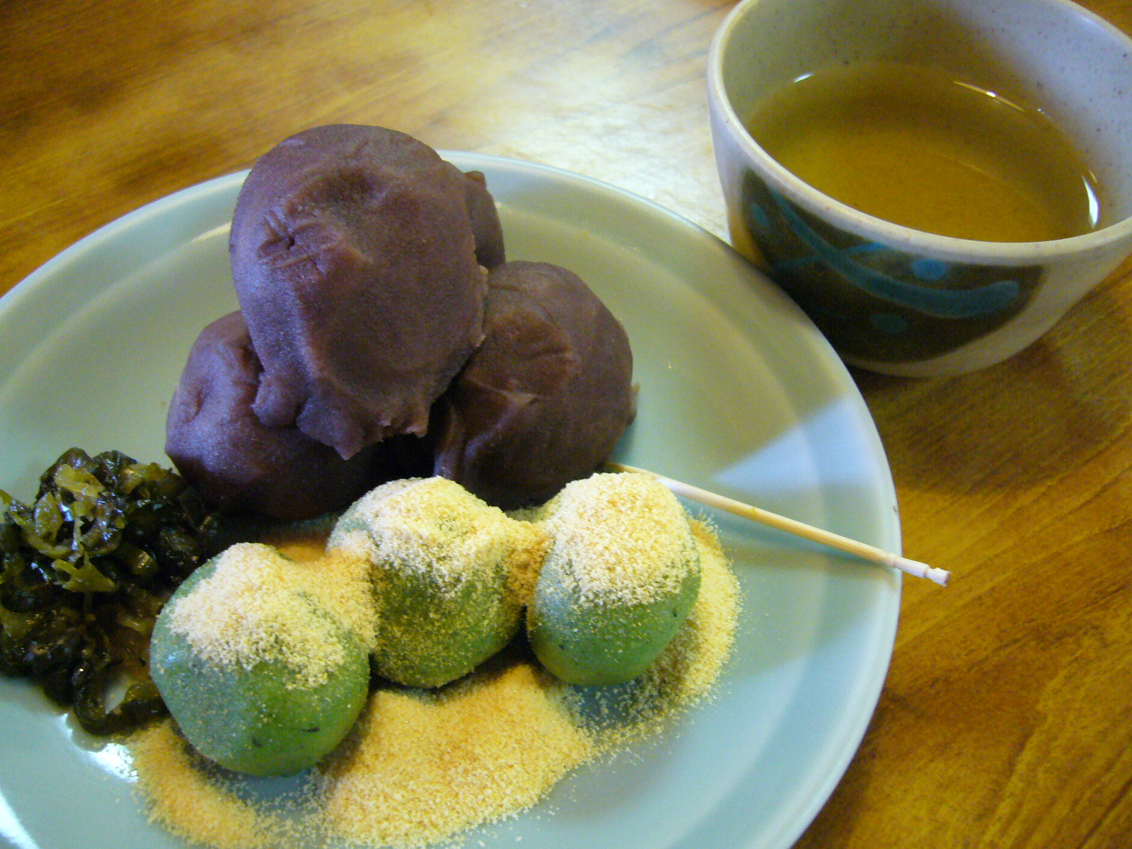 kusa-dango,katori-city,japan